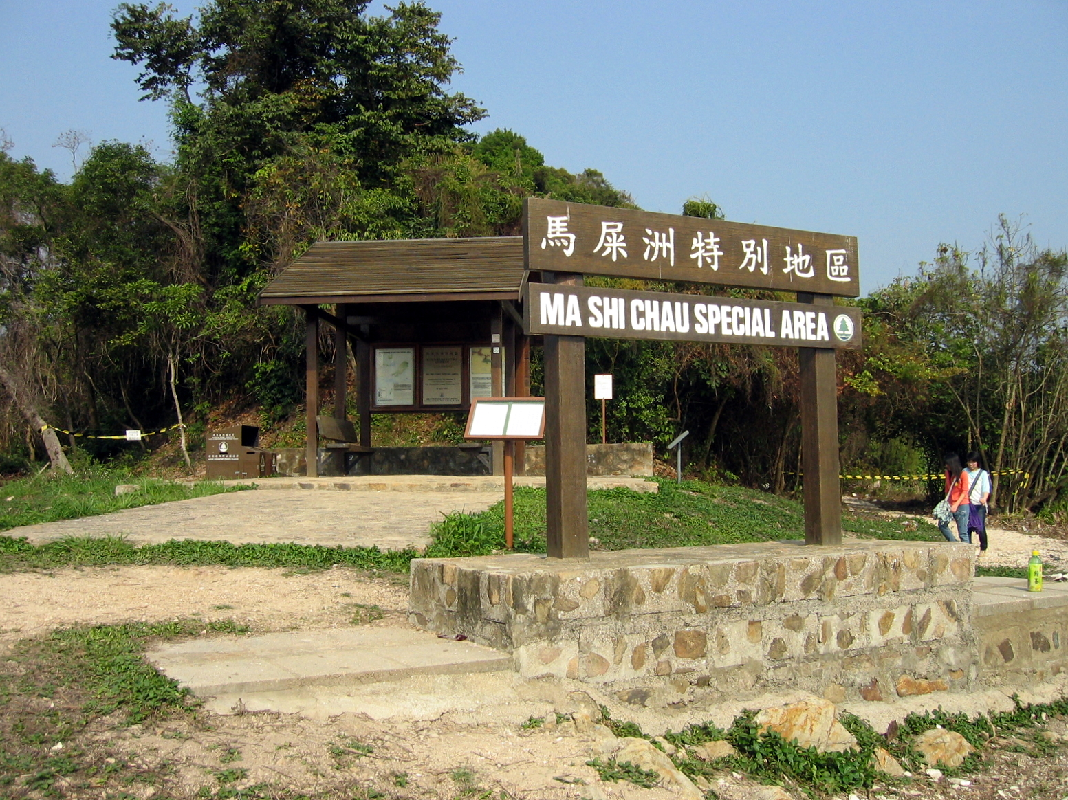 HK Ma Shi Chau Special Area Sign